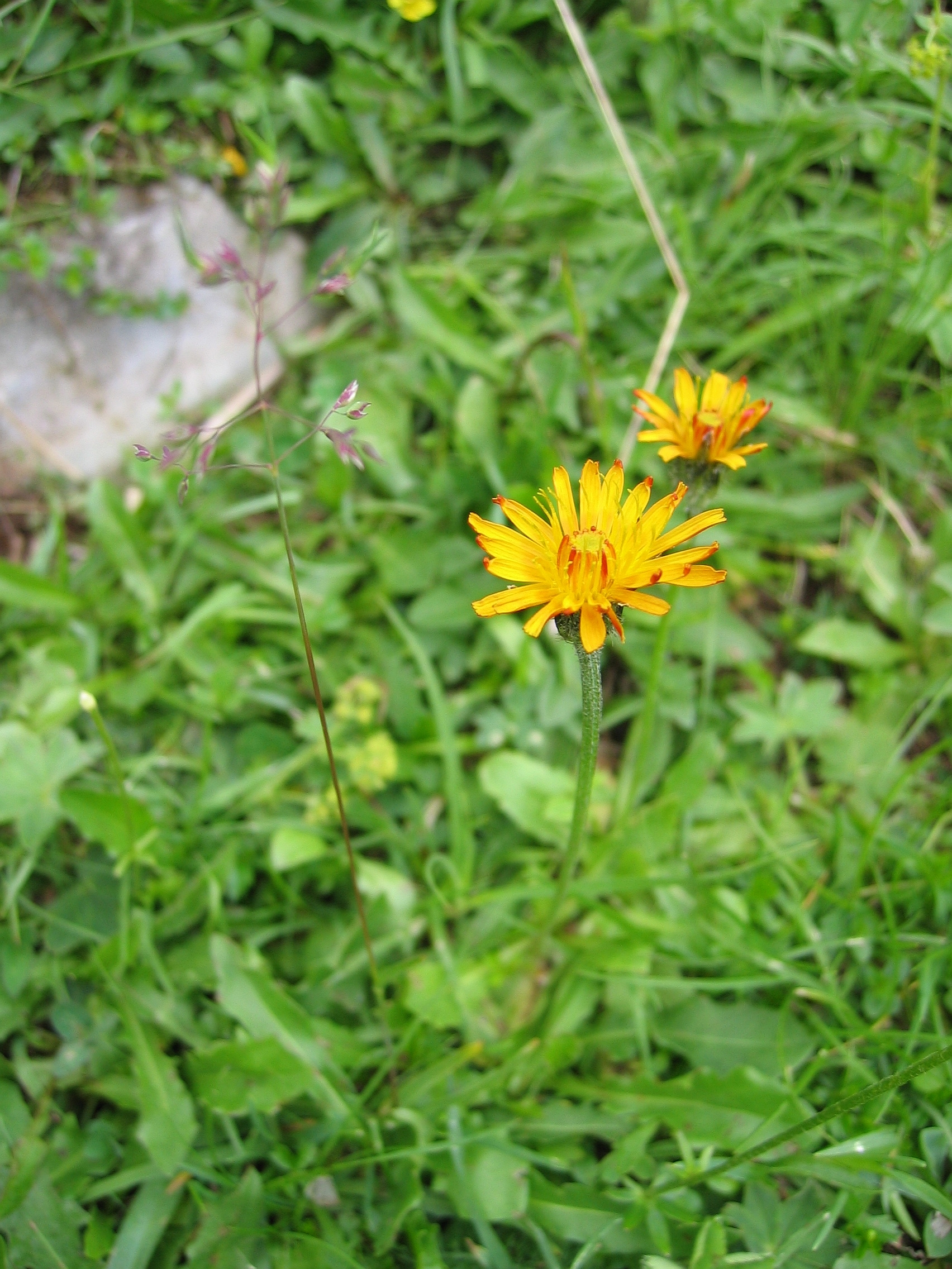 Crepis aurea,Wurzeralm, Upper Austria, Austria